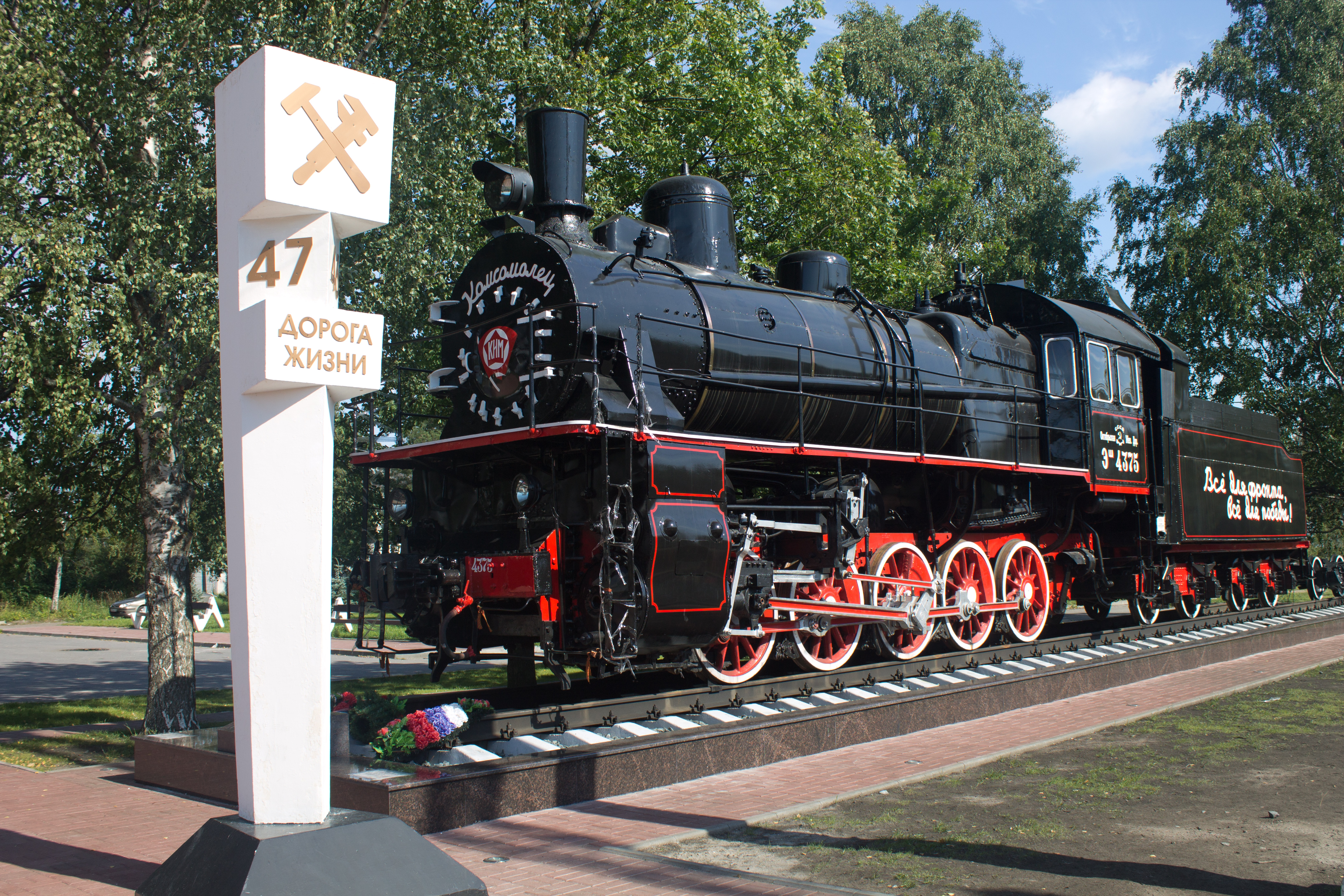 Паровоз, работавший на 'Дороге жизни': юж.ж/д вокзала, Ладожское озеро, Всеволожский район, Ленинградская область